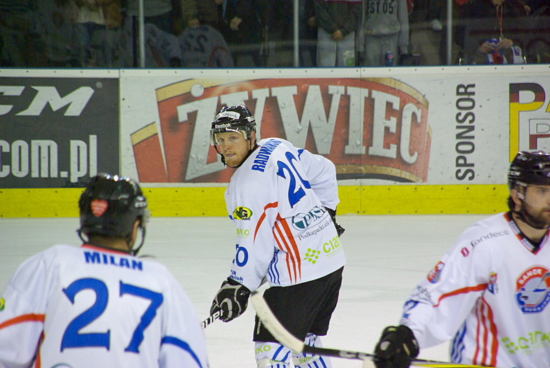 Wojciech Milan, Michał Radwański i Maciej Mermer w barwach Ciarko PBS Bank Sanok podczas czwartego meczu finałowego o Mistrzostwo Polski 2011/2012 z ComArch Cracovią (Arena Sanok, 14 marca 2012)